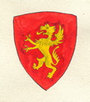 Stemma della famiglia Martelli